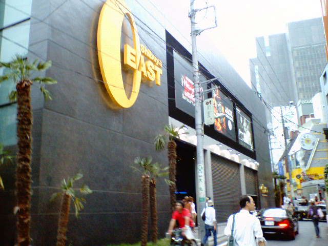 Shibuya O-EAST 撮影者:Goki 撮影日:2004年7月19日 この画像はGFDLで利用できます。Goki 2004年8月12日 (木) 08:16 (UTC)